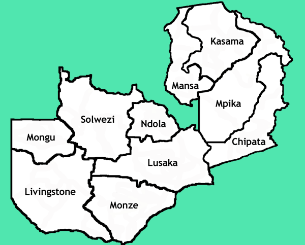 Mappa delle diocesi dello Zambia. Lavoro personale, eseguito a partire da questa immagine di Commons. Fonte per i confini: Guida delle missioni cattoliche 2005, a cura della Congregatio pro gentium evangelizatione, Roma, Urbaniana University Press, 2005. Categoria:Chiesa cattolica in Zambia Categoria:Mappe dell'Africa